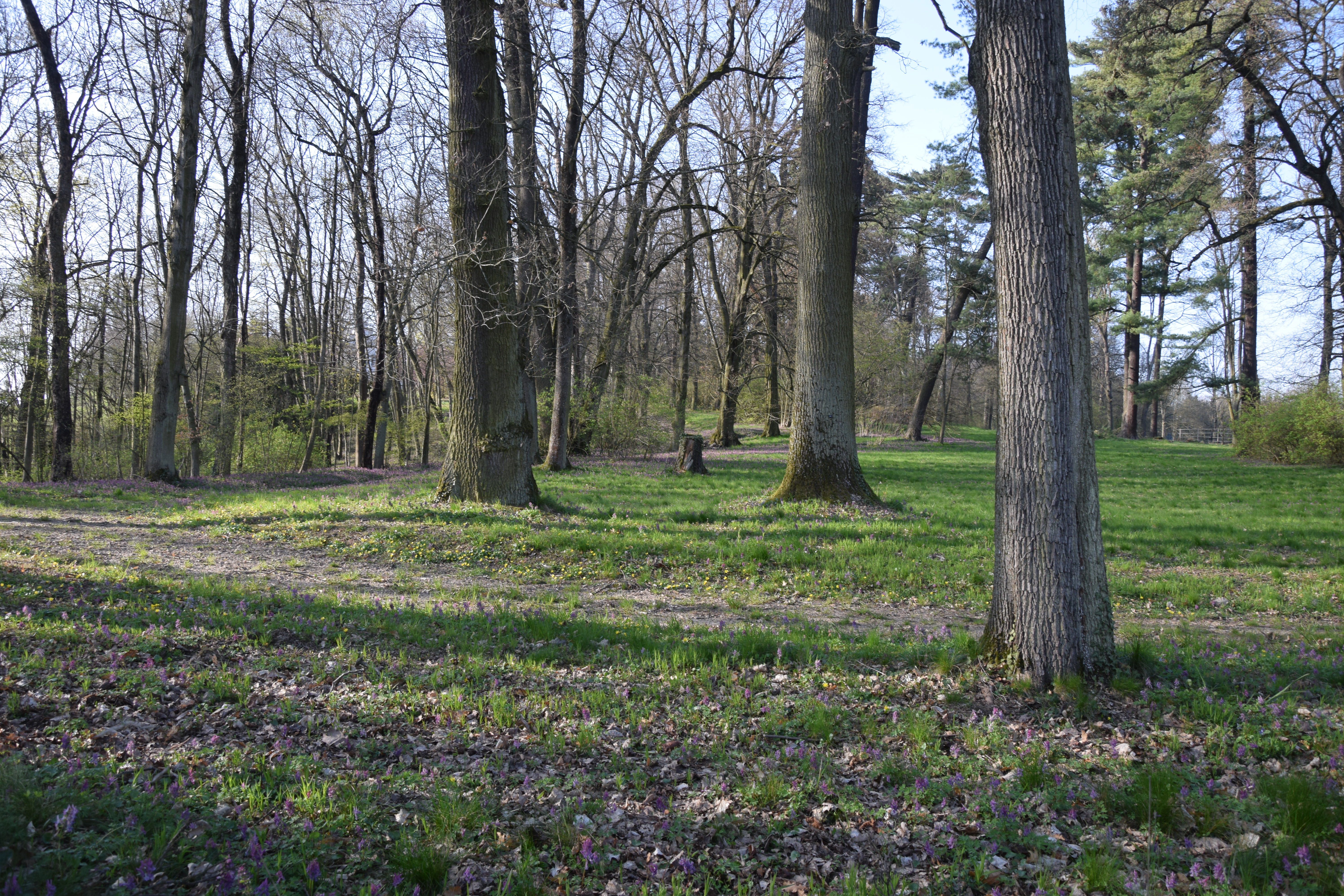 Wiesbaden Frauenstein Schloss Sommerberg Park